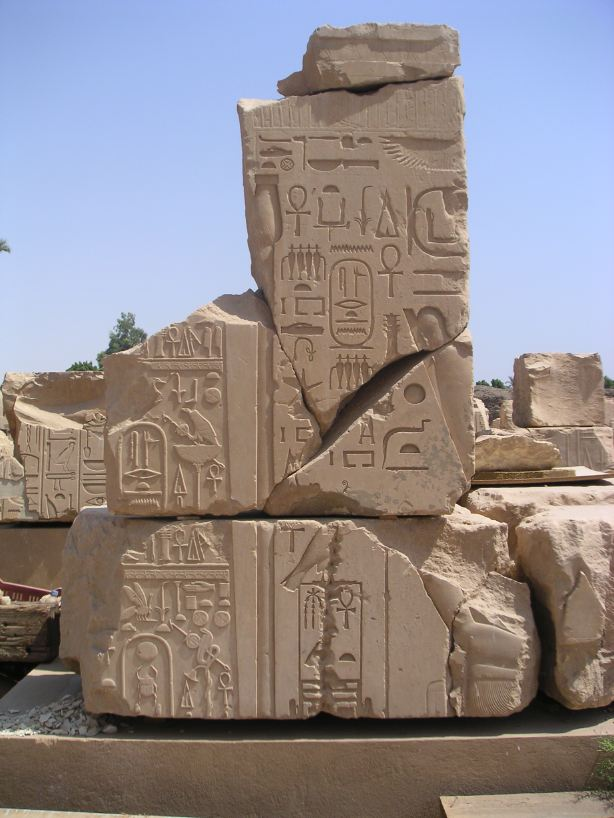 Relief du temple d'Amon de Sésostris Ier - Musée en plein air de Karnak - XIIe dynastie égyptienne